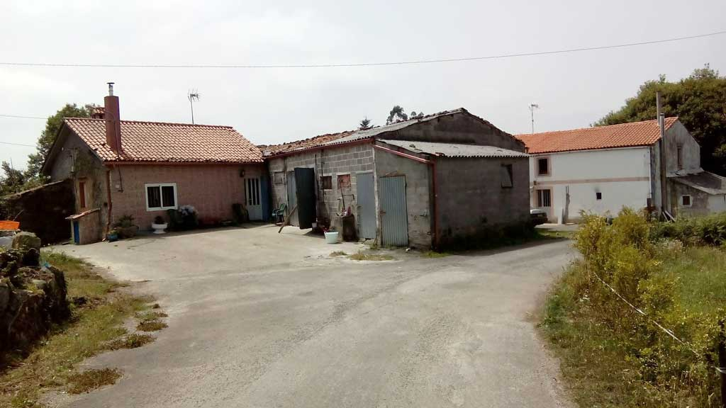 Vista da Devesela, Curtis.